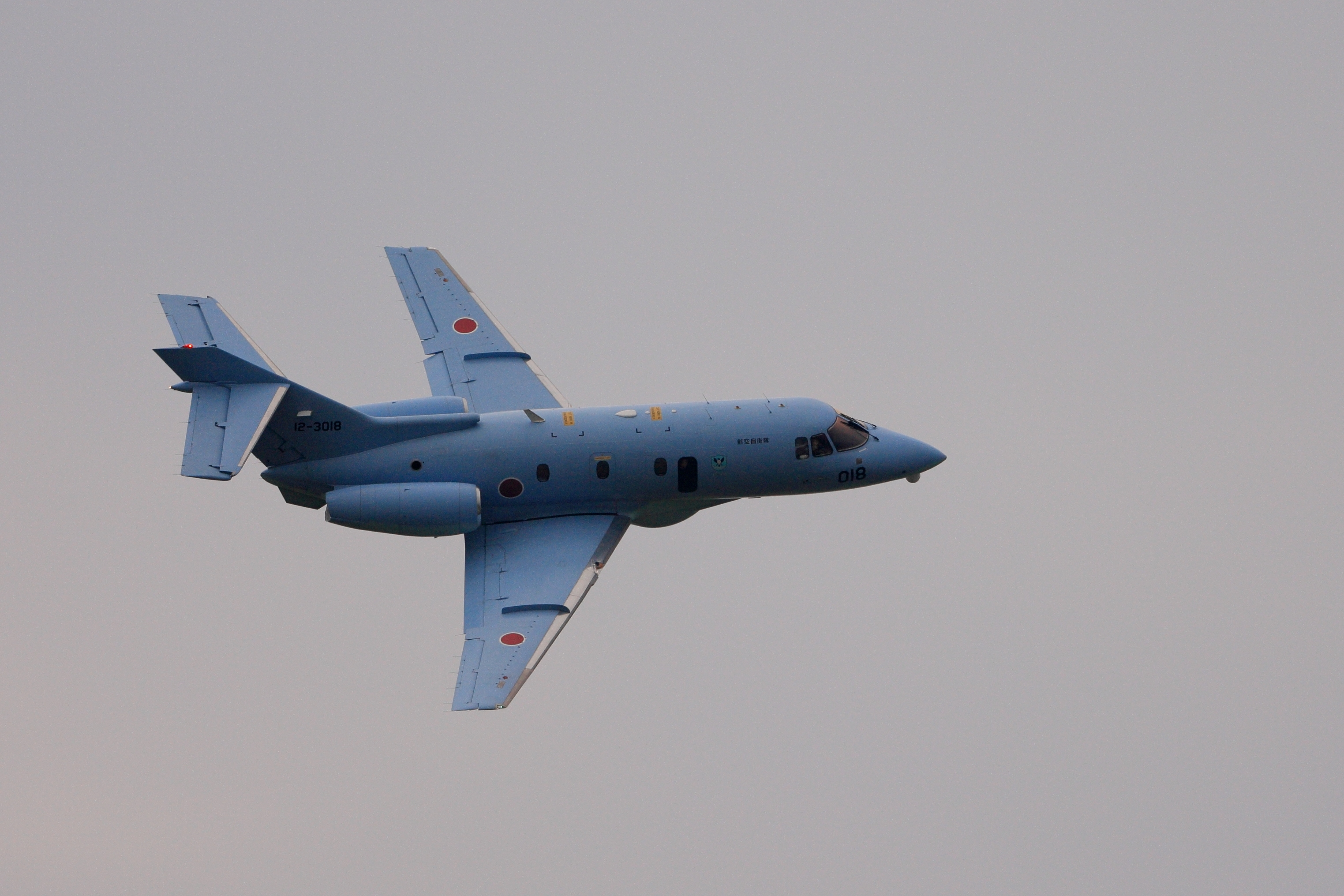 航空自衛隊小松救難隊のU-125A